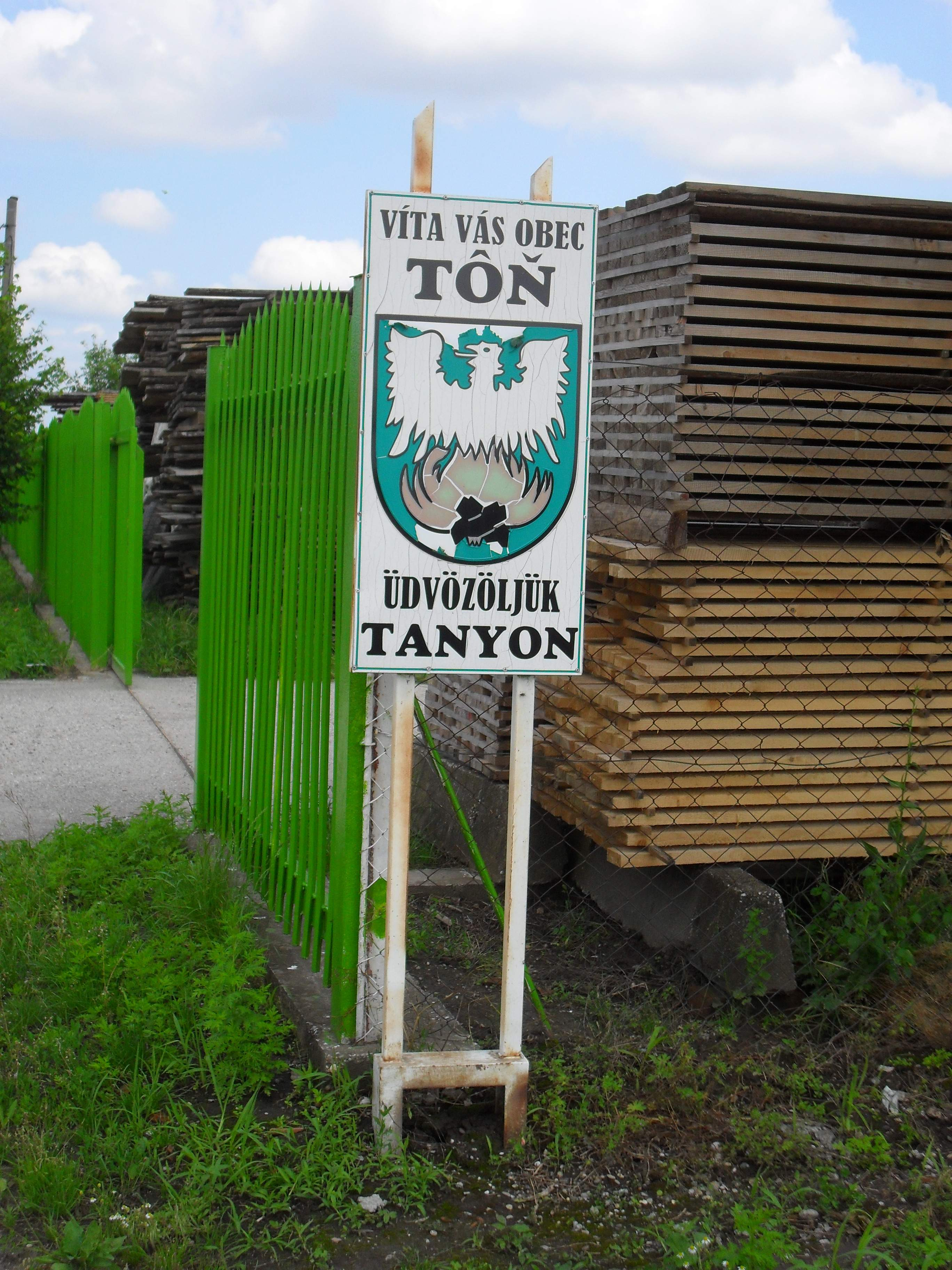 Tany - címeres üdvözlőtábla